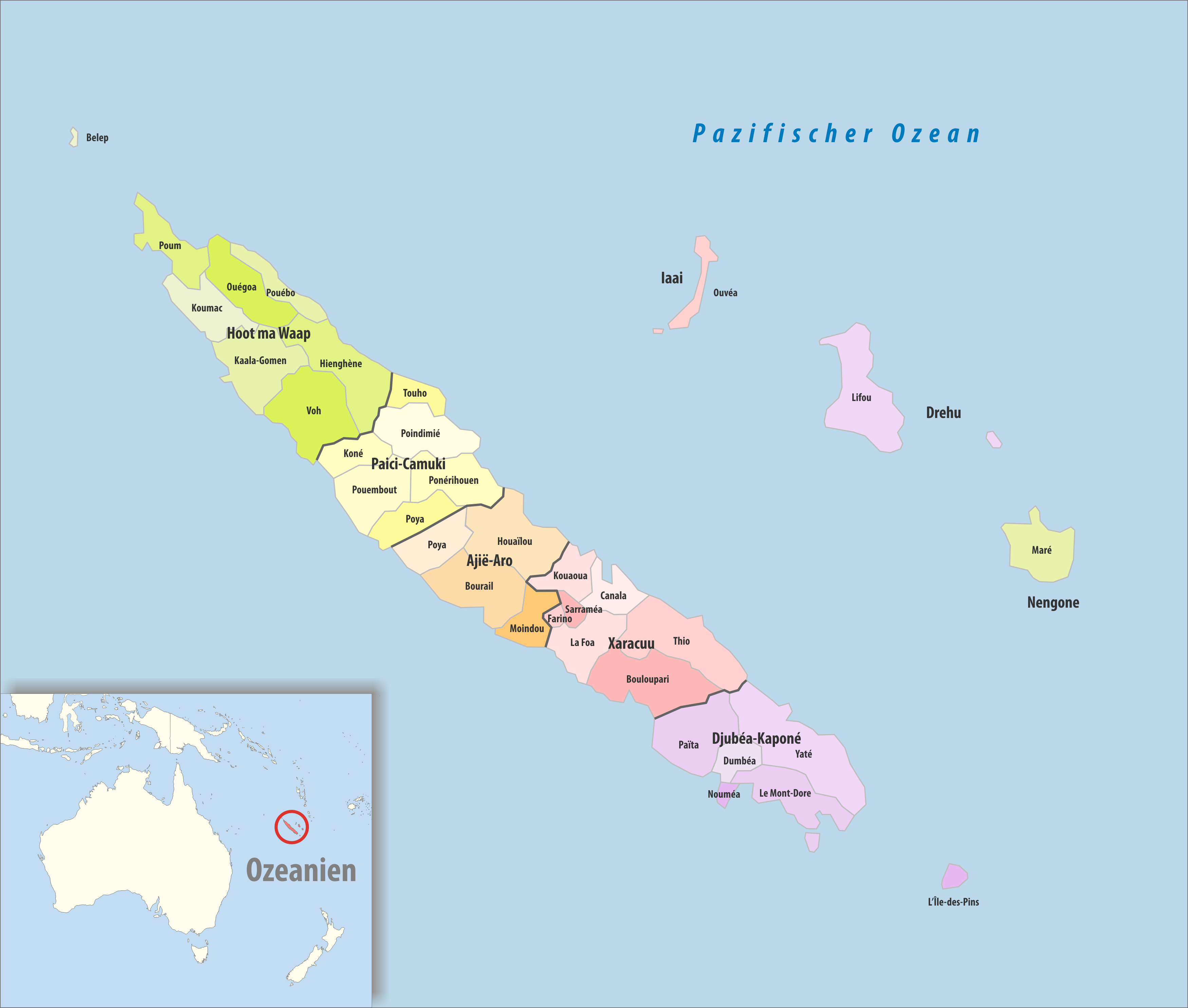 Gemeinden und Gemeindeverbände in Neukaledonien